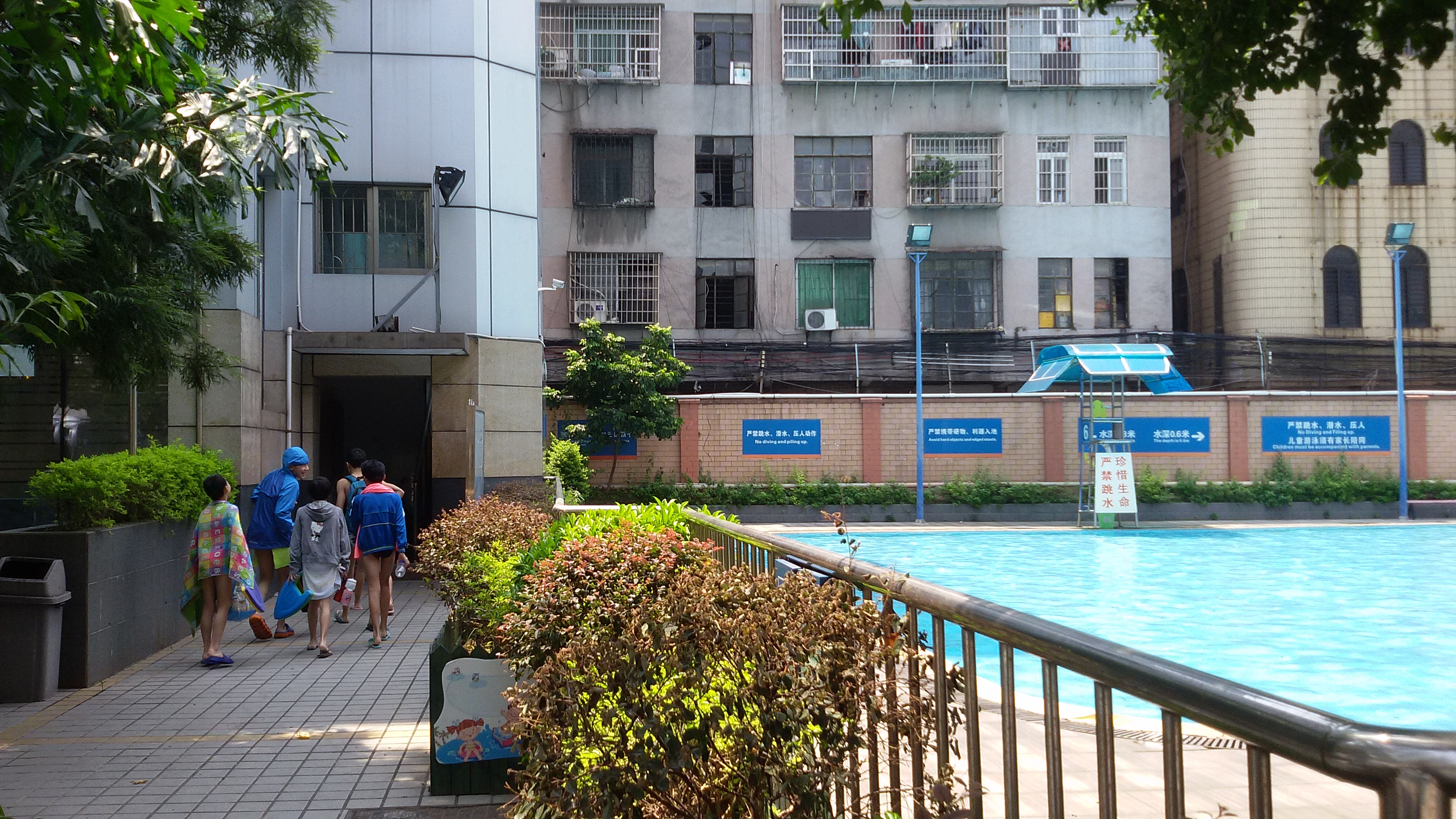 粵語: 矿泉泳场嘅儿童池东边间宿舍通道附近